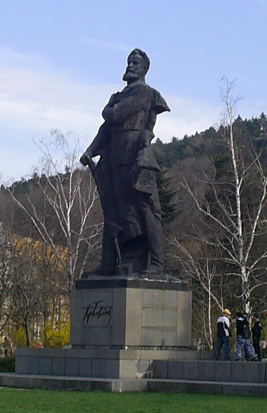 Детайл от [1]